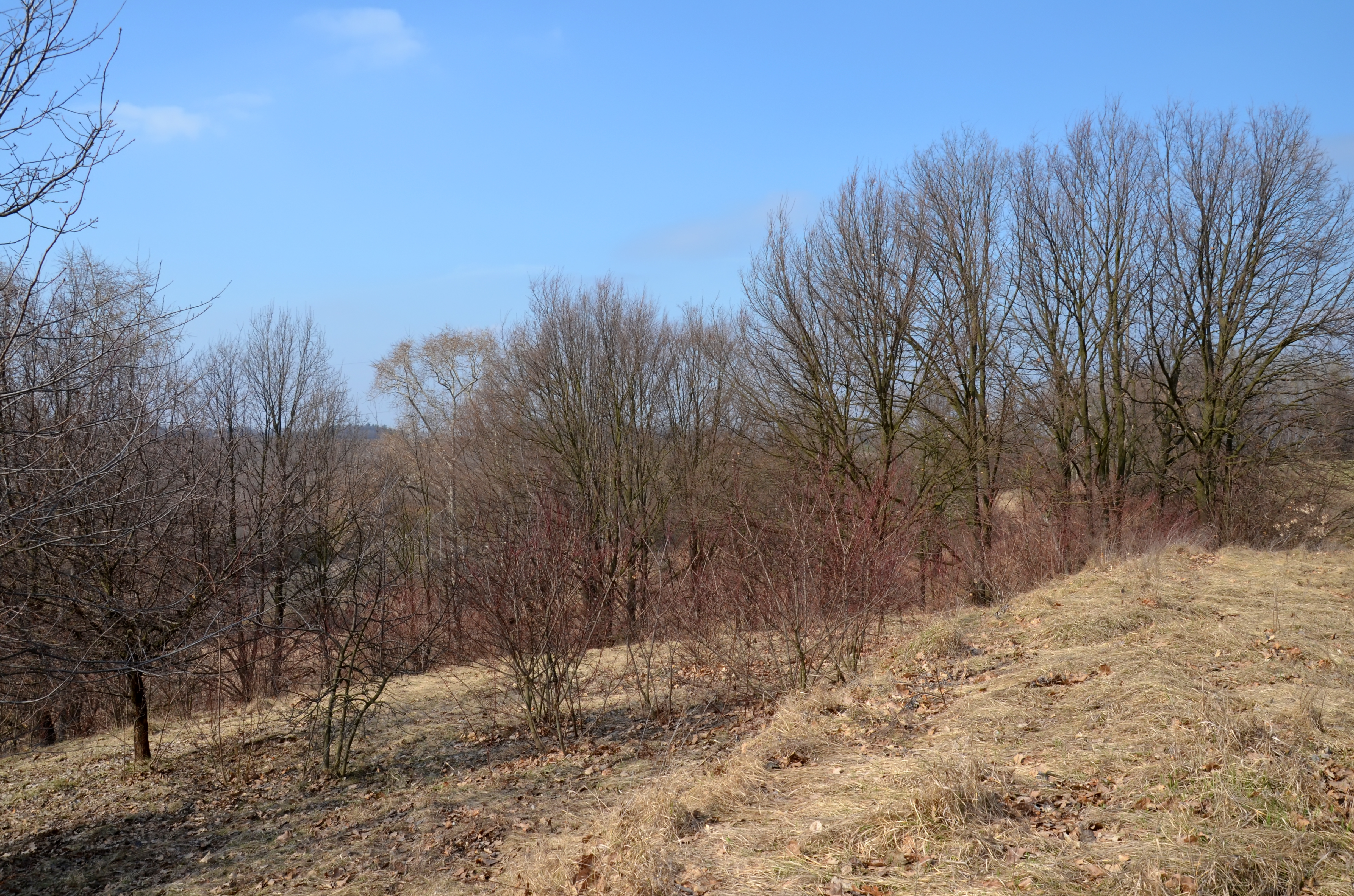 «Кожанська балка», Фастівський район, Малополовецька сільська рада